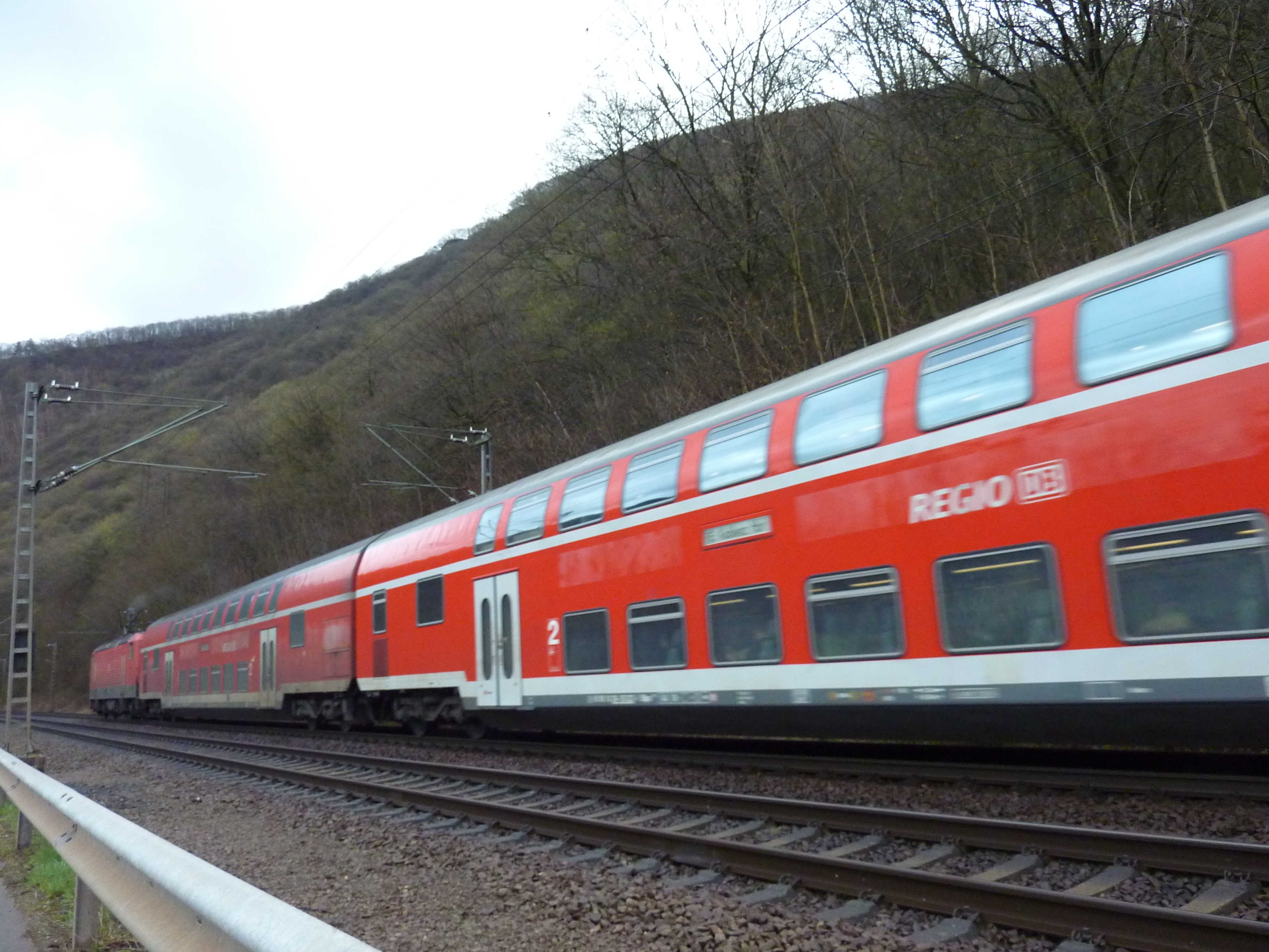 Zug auf der Saarstrecke, Nähe Serrig